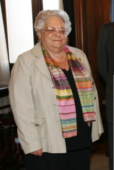 Carmen María Argibay, jueza de la Suprema Corte de la República Argentina